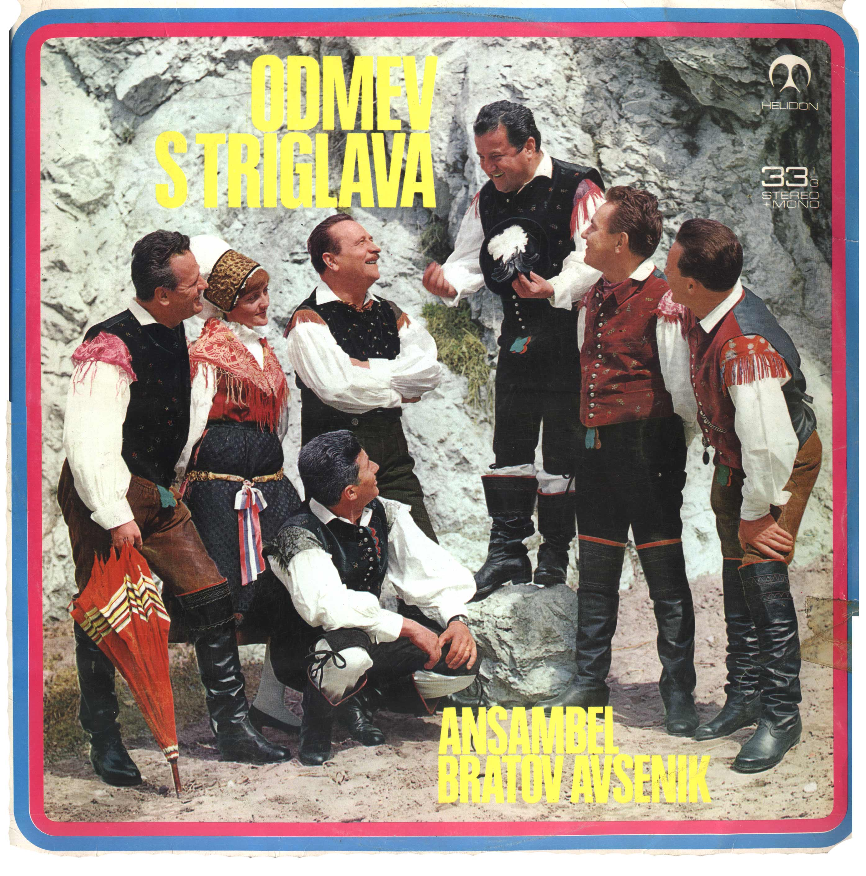 Naslovnica gramofonske plošče Odmev S Triglava Ansambla Bratov Avsenik